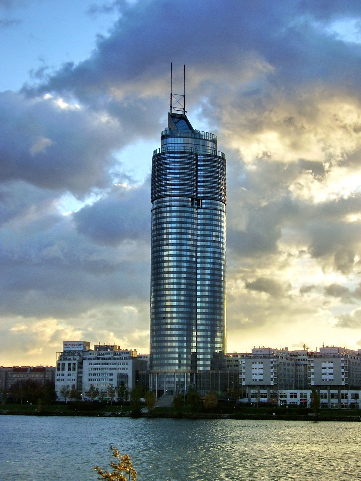 Vienna 2 november 2006